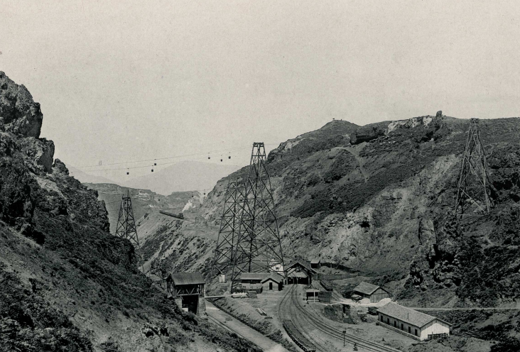 Orconerako trenbidea eta aireko trenbidea